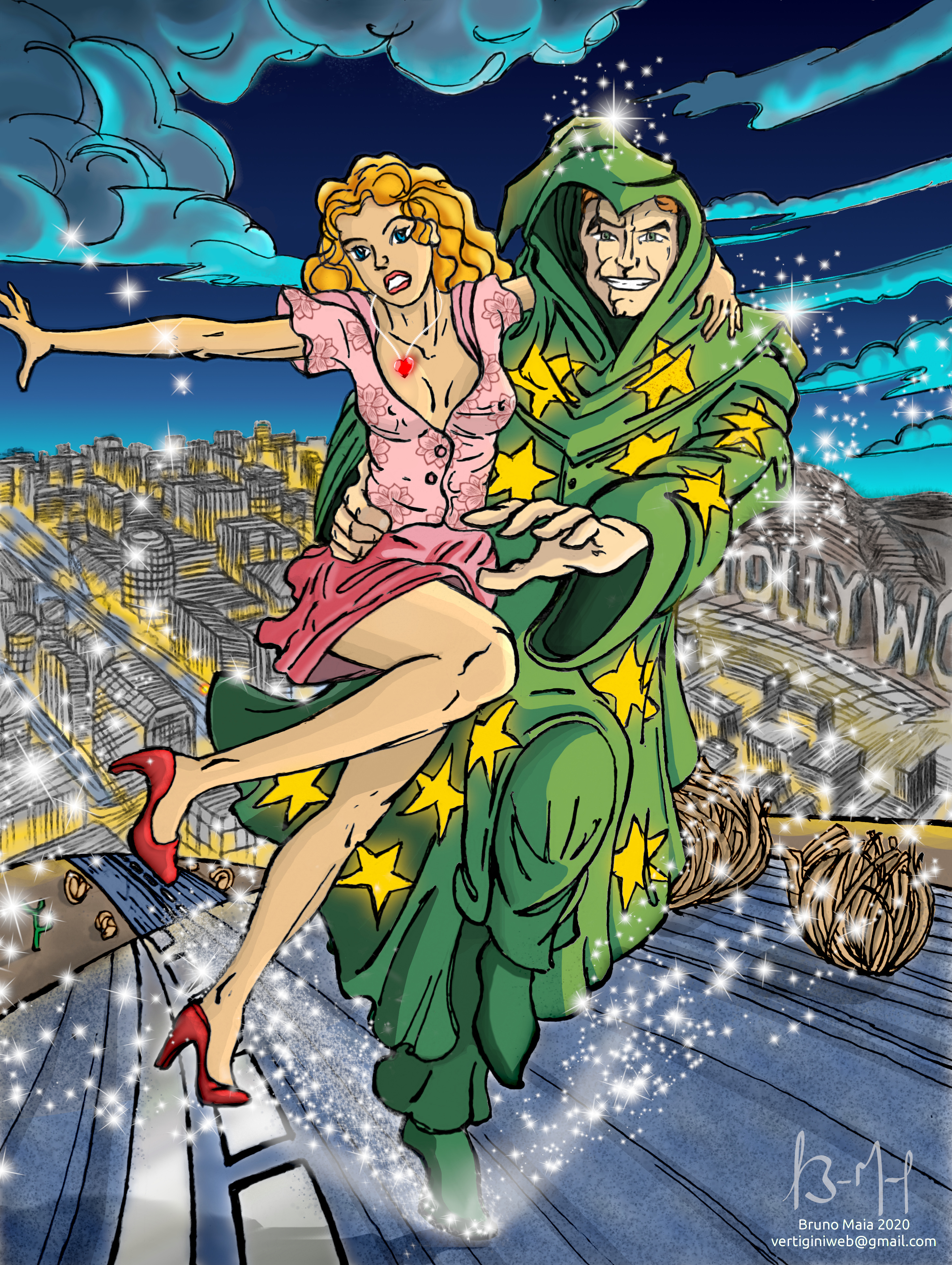 Fanart para expressão artística acerca do filme The Wizard of Speed and Time de Mike Jittlov. Estou doando para a comunidade.